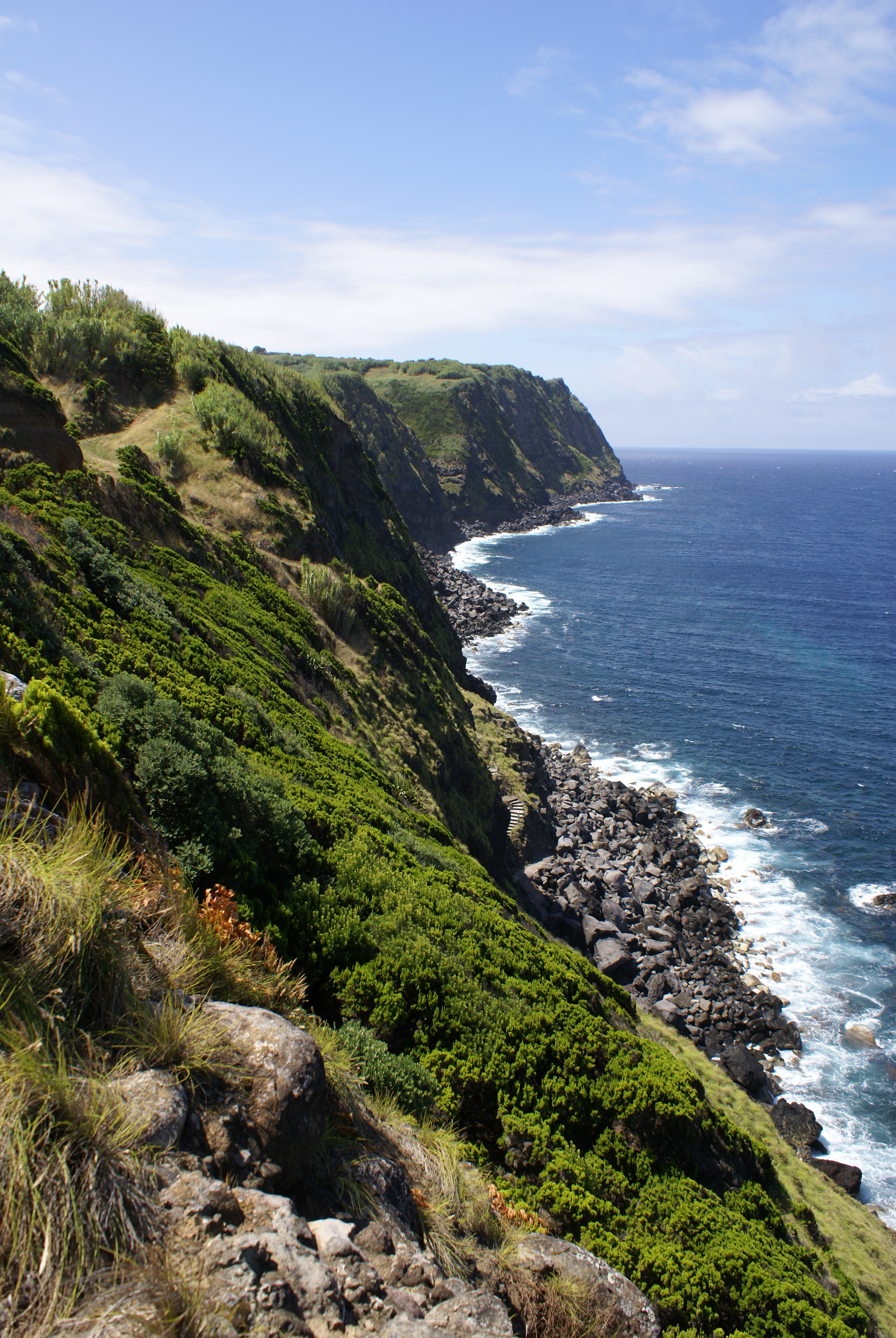 Parque do Pelado, Lomba da Fazenda, Nordeste, ilha de São Miguel, Açores